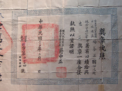 楊養正的國民政府軍事委員會忠貞獎章執照。